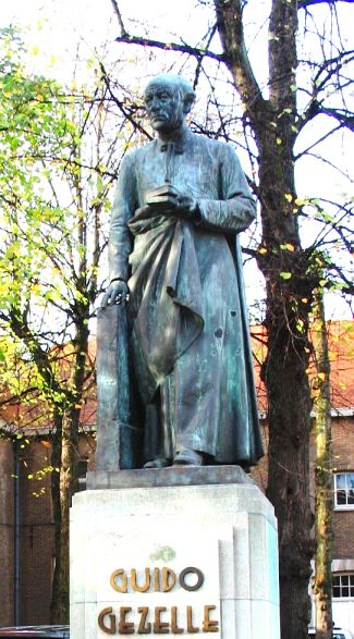 Guido Gezelle te Brugge - eigen foto